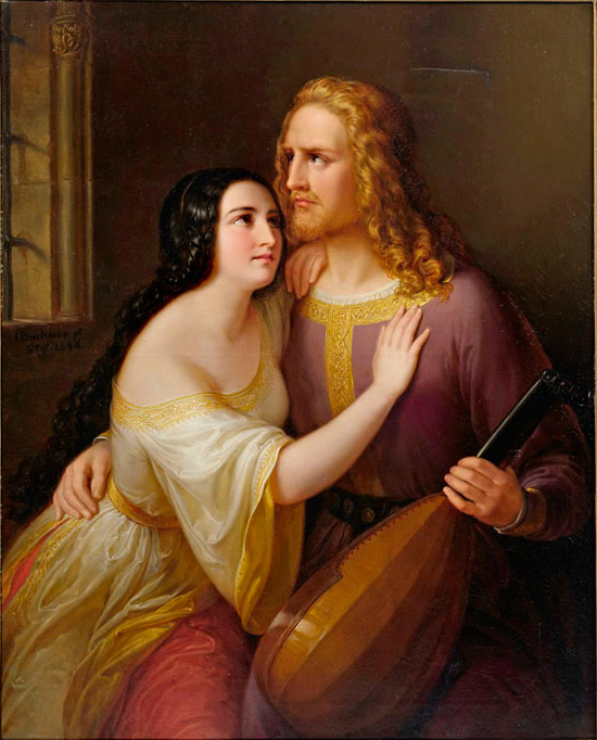 Abschied König Enzios von seiner Geliebten Lucia Vidageli